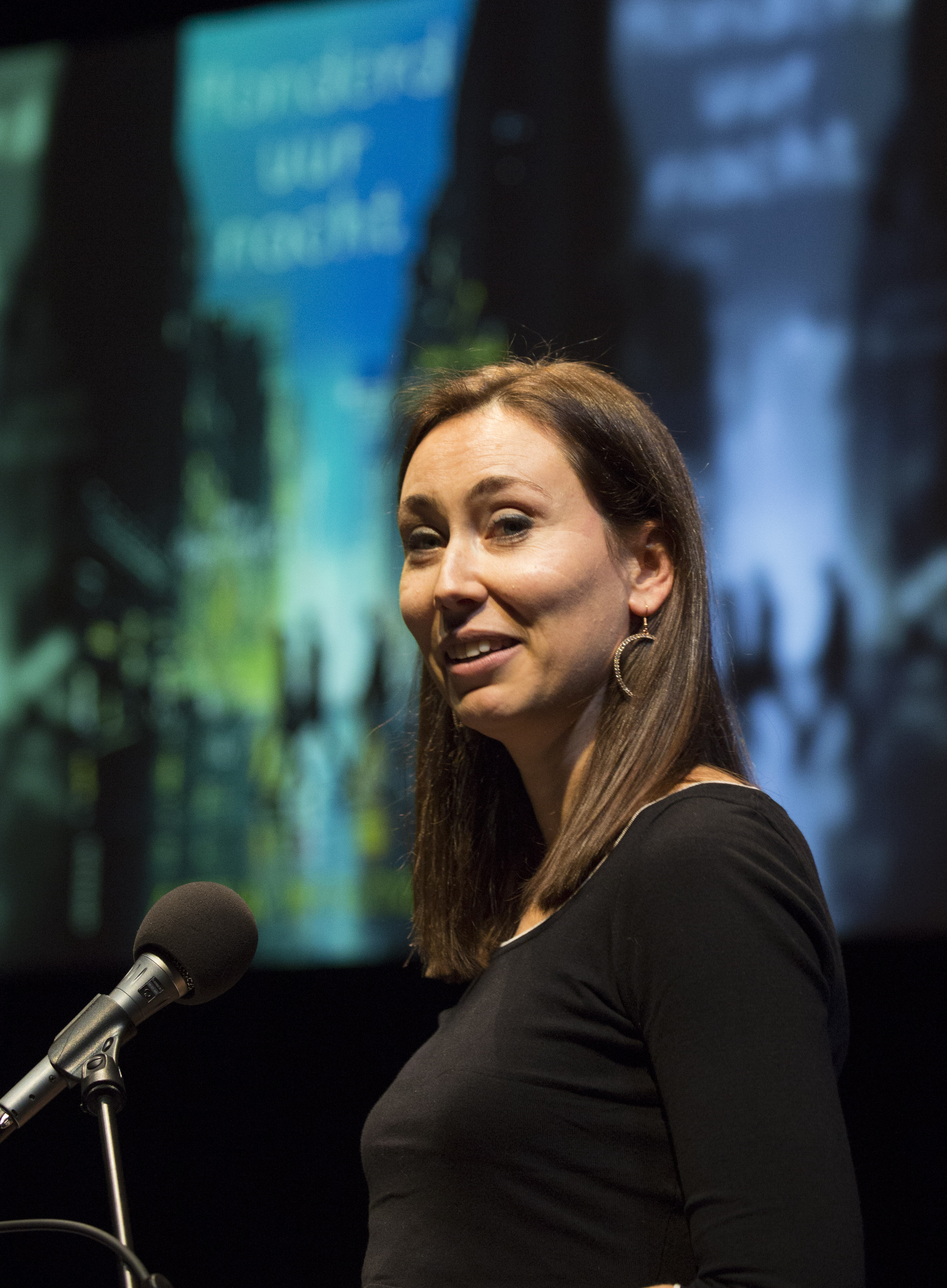 Anna Woltz - Schrijversfeest - Winternachten 2016 Schrijversfeest Theater aan het Spui, Den Haag, Nederland